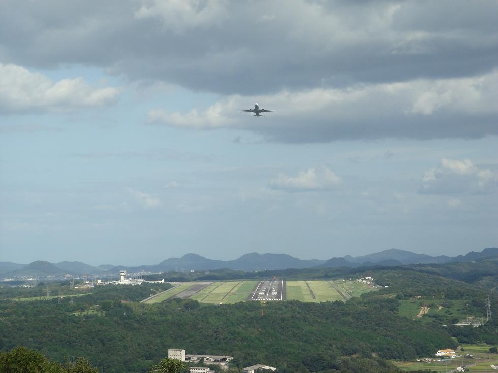 香川県綾川町高山航空公園から見た高松空港